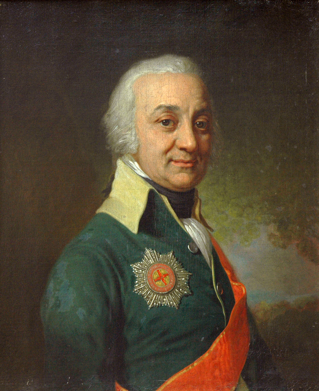 Рунич Павел Степанович (1747-1825)